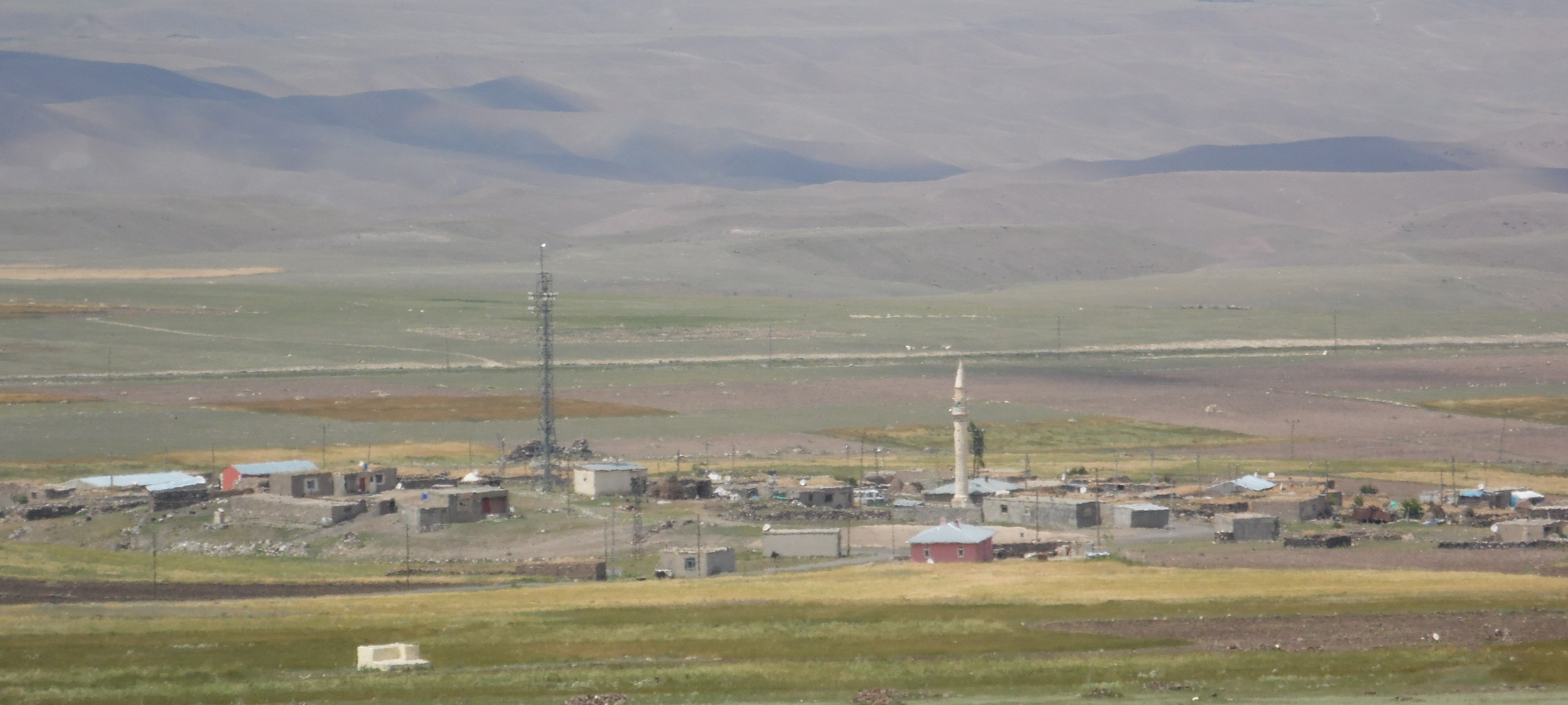 kervansaray